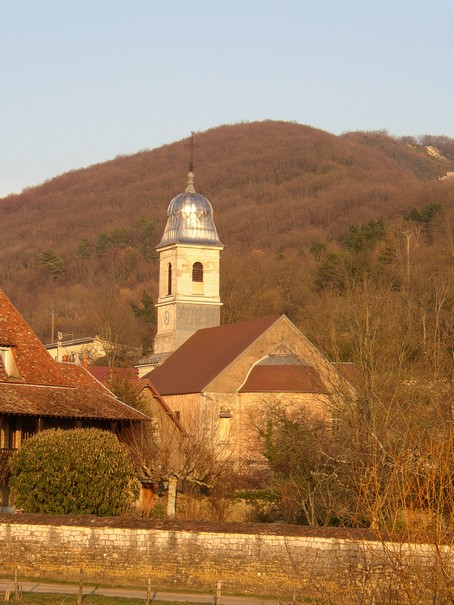 Summary Eglise d'Avanne-Aveney, vue depuis le pont On remarquera son clocher Comtois (Photo J L) Licensing